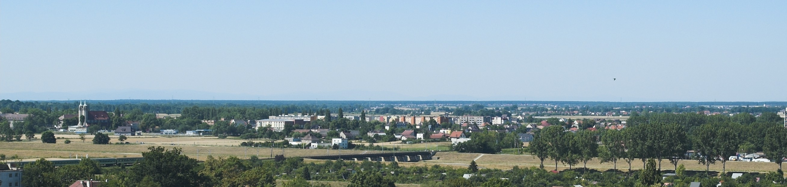 The panorama of Opole-Szczepanowice